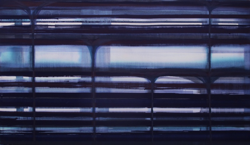 Oil and acrylic on canvas 110 x 190cm